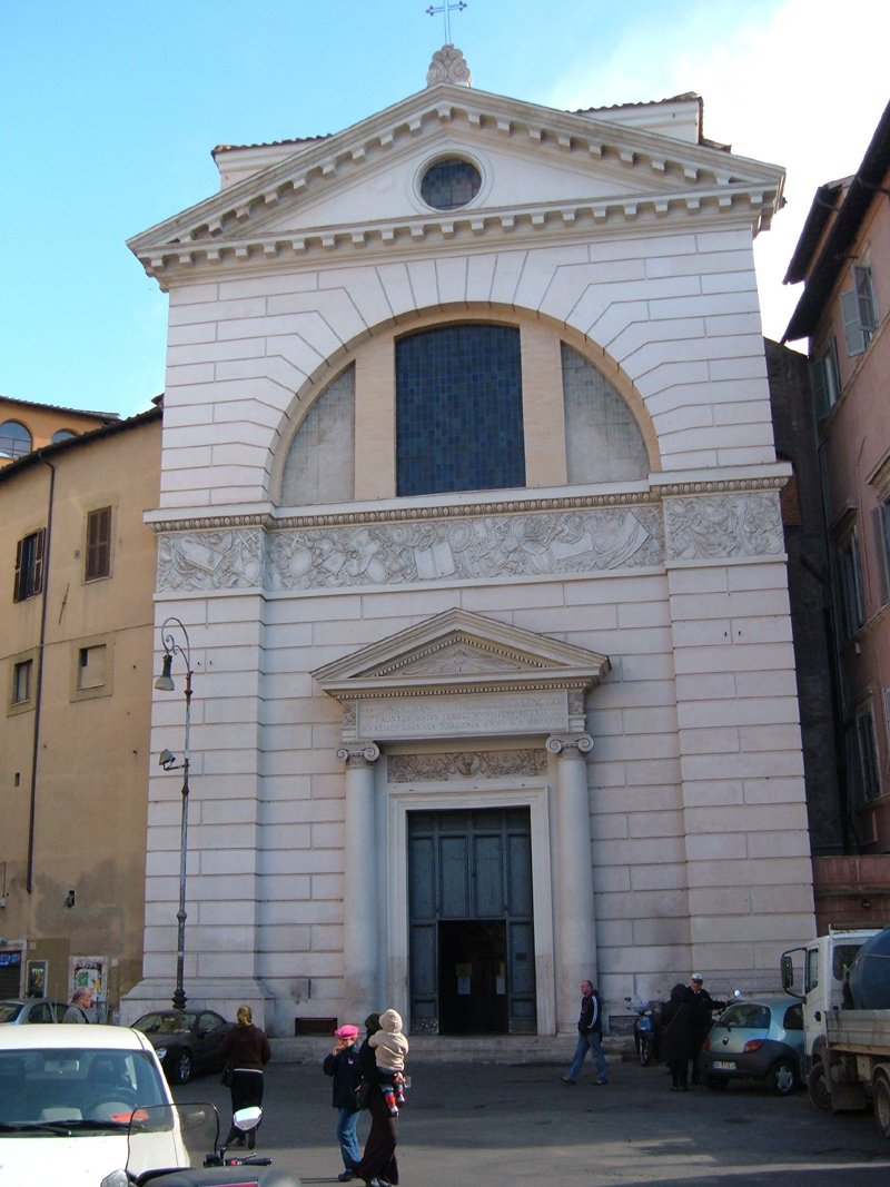 Chiesa di San Pantaleo, a Roma, nel rione Parione. Foto personale.